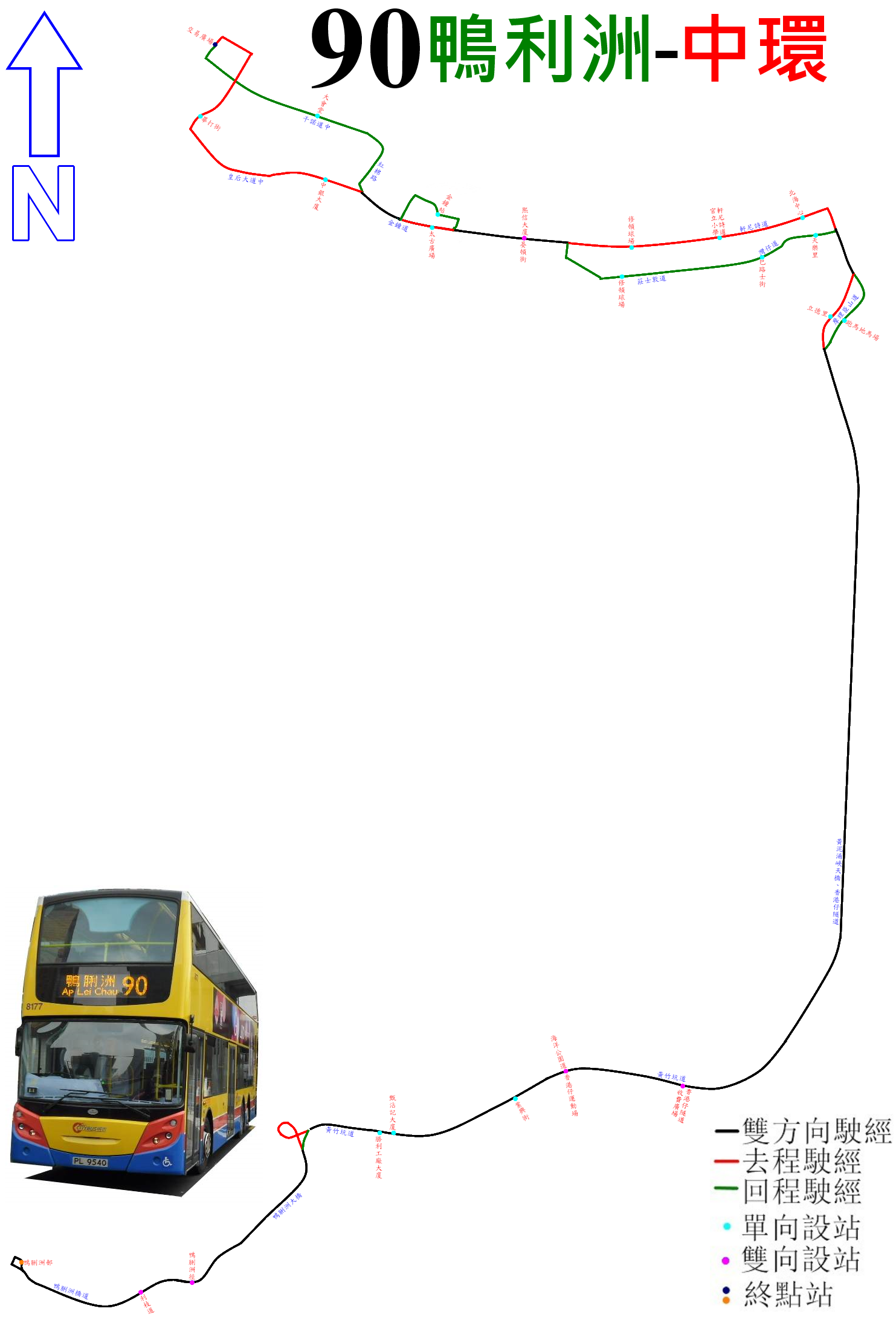 中文（香港）: 城巴90號線走線圖